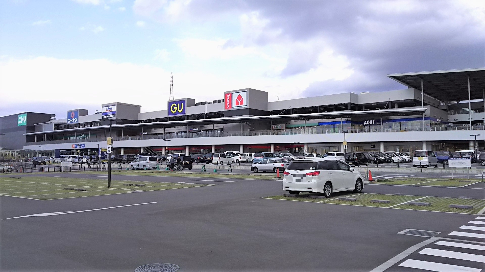 ニトリモール枚方ノースコート（大阪府枚方市）